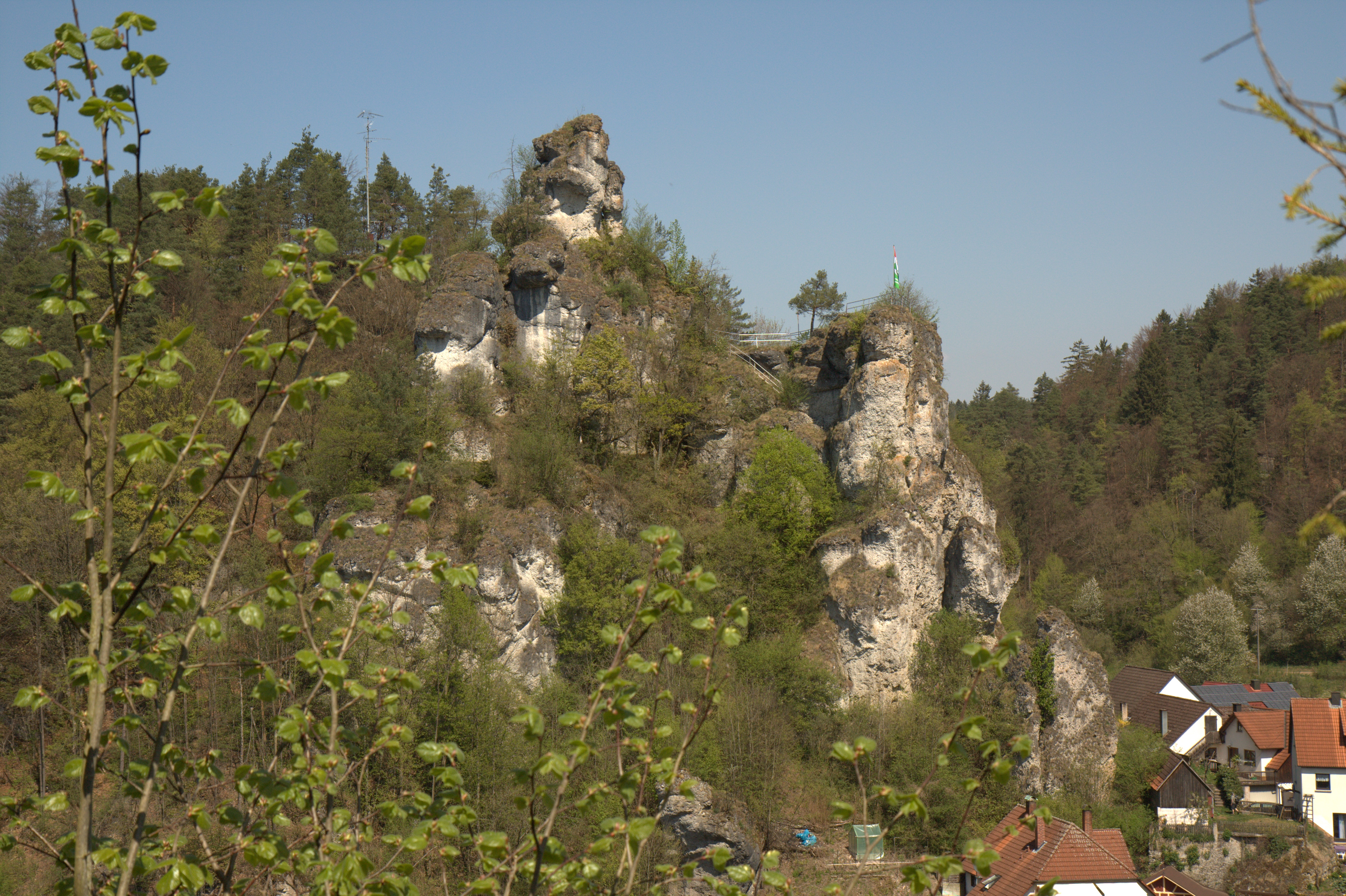 Burgstall Oberntüchersfeld - Ansicht des Burgfelsens aus südwestlicher Richtung